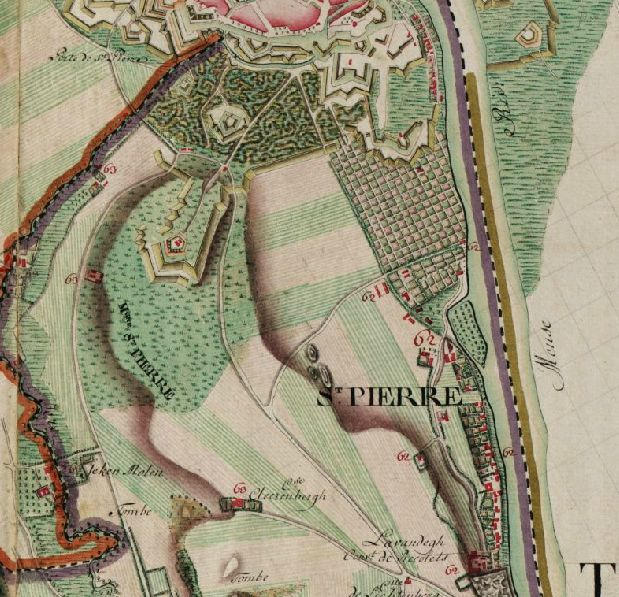 Sud de Maastricht.